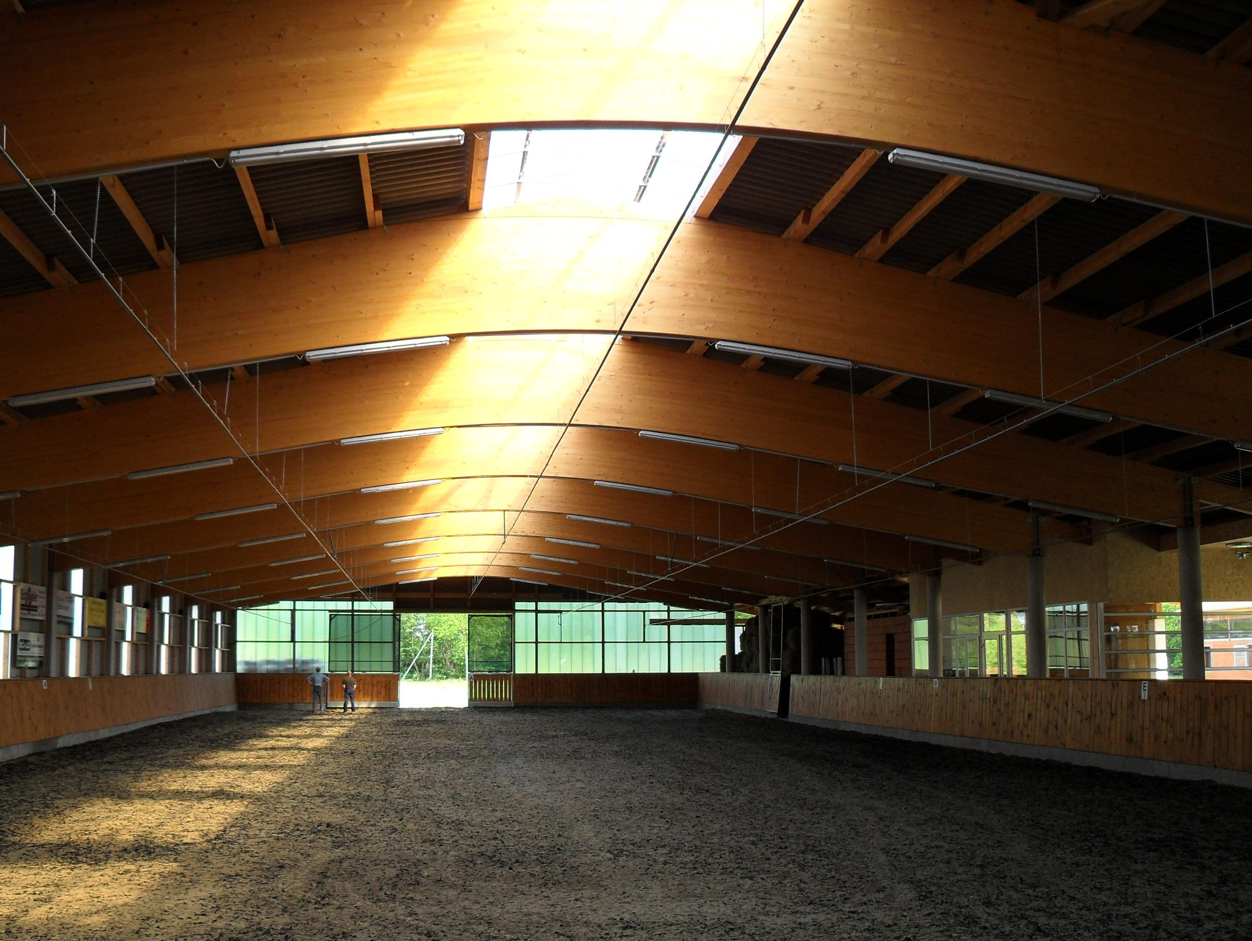 Düsenrohre